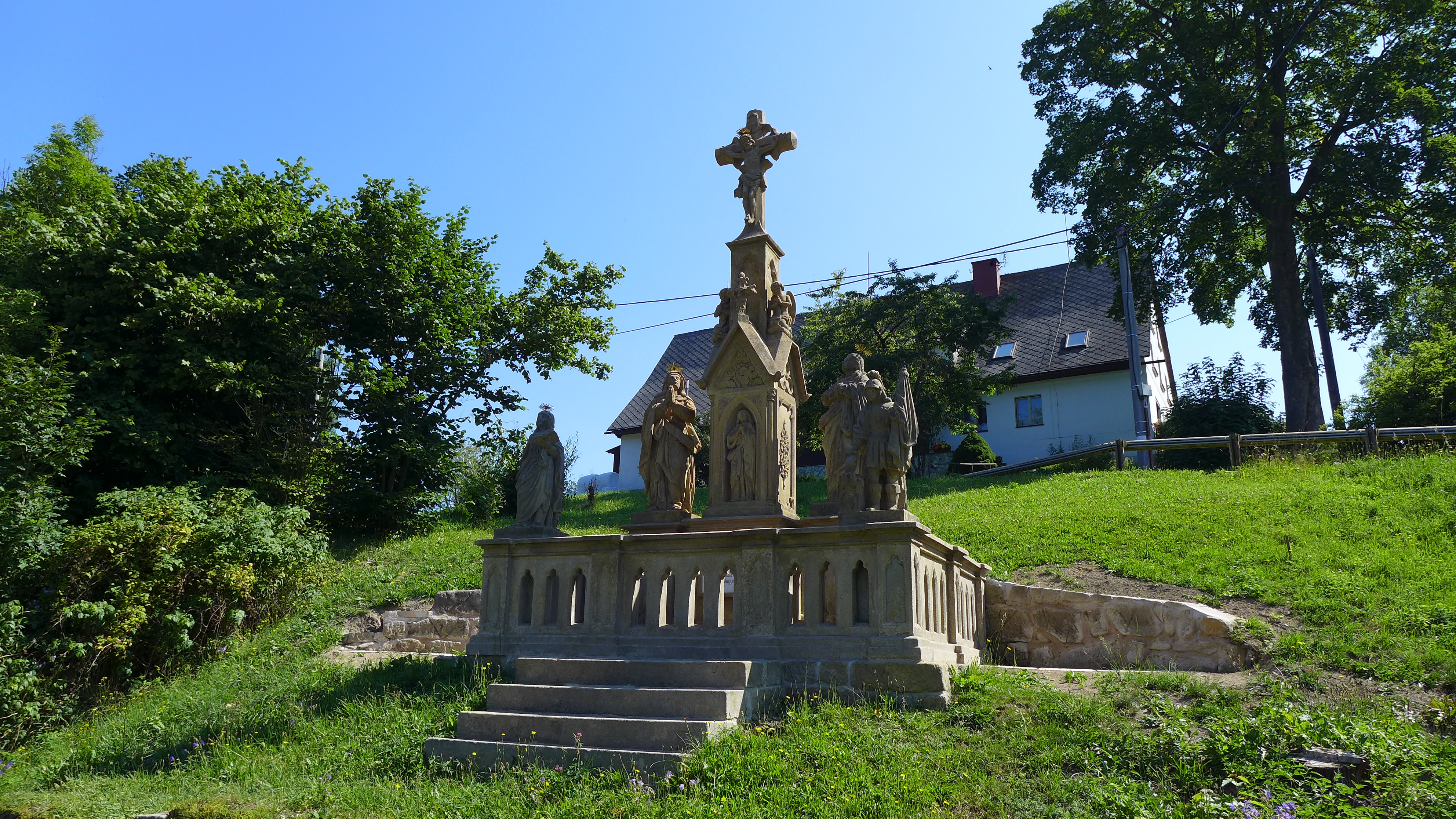 Sousoší Ukřižování, náves, parcela pp. 730/1, Hlavňov (Police nad Metují).